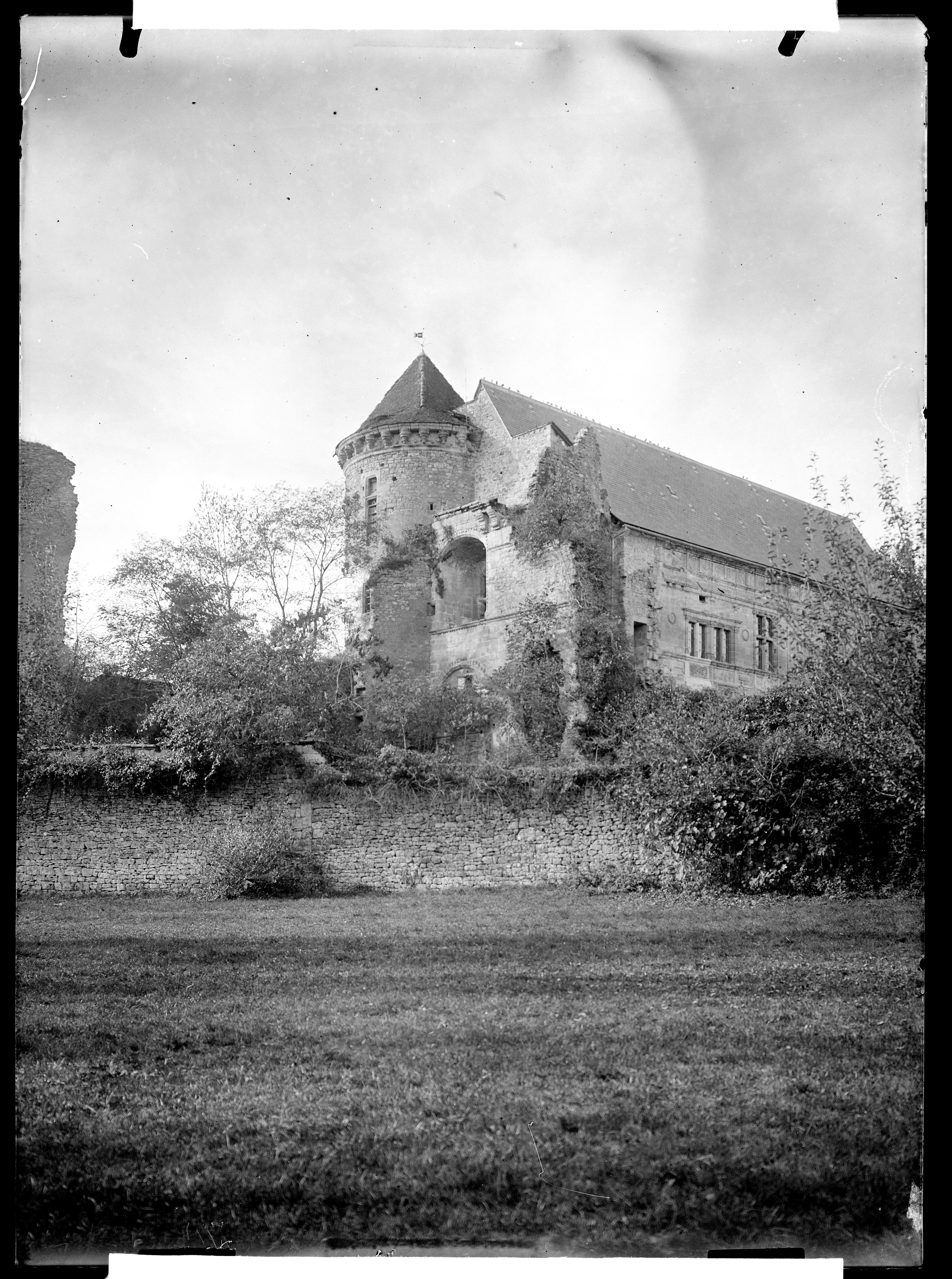 plaque négative au gélatino-bromure d'argent format 13x18cm. inscription manuscrite par Eugène Trutat sur enveloppe : "Château d'Assier : pignon sud 28 Oct. 1903 "